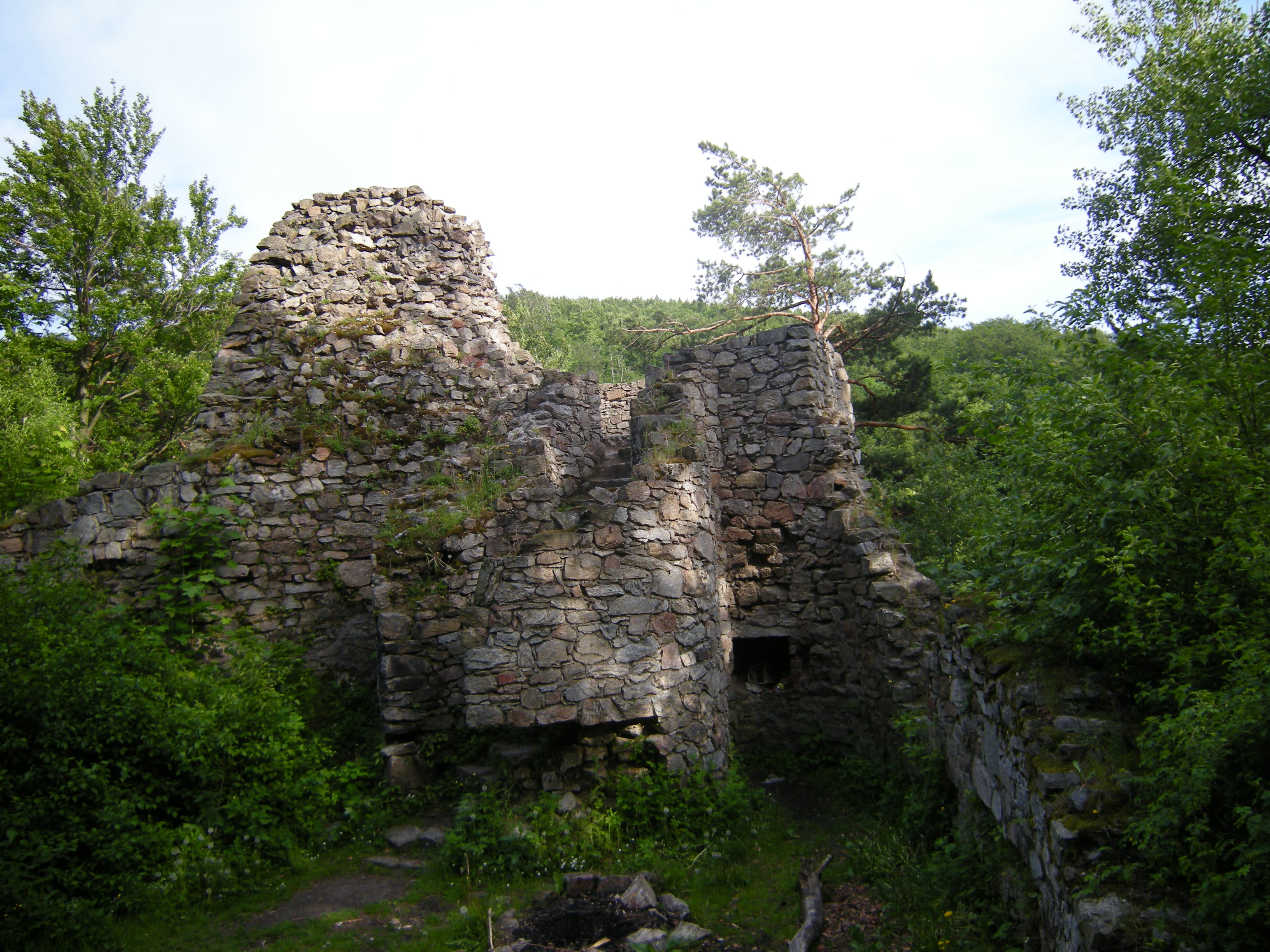 Ruiny zamku Rychleby w Górach Złotych w pobliżu Javornika